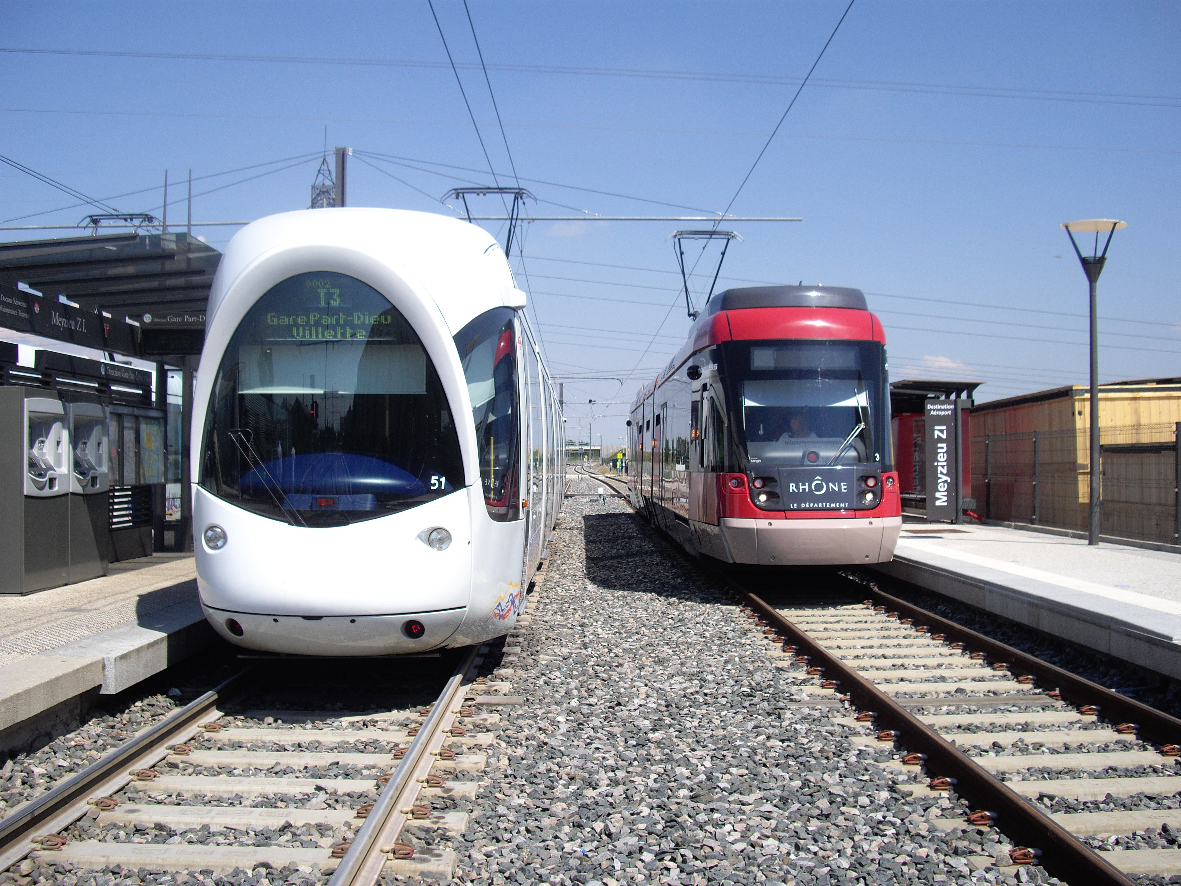 Rames des lignes T3 et RhônExpress cote-à-cote, à Meyzieu Z.I.